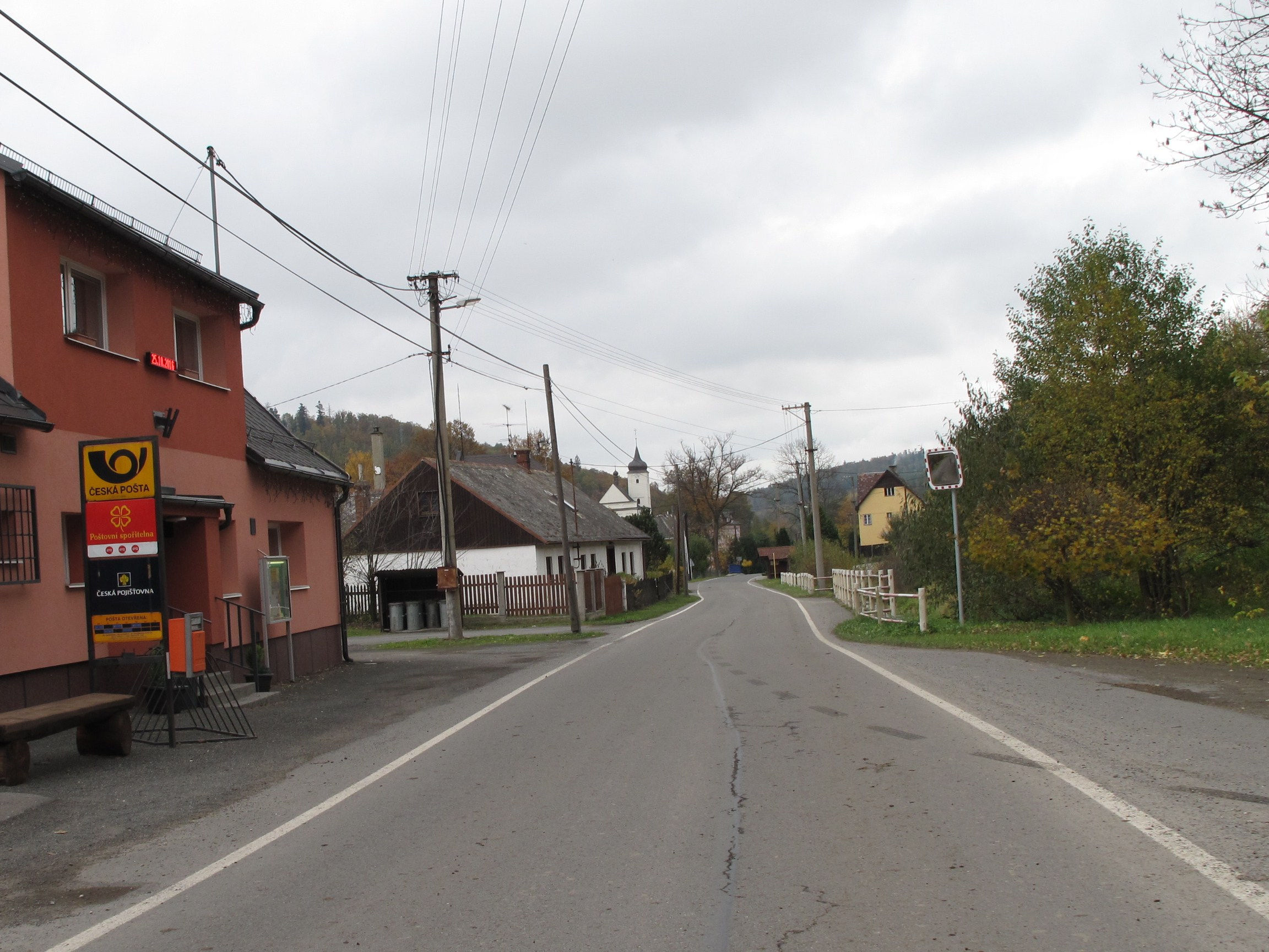 Krasov. Okres Bruntál, Česká republika.